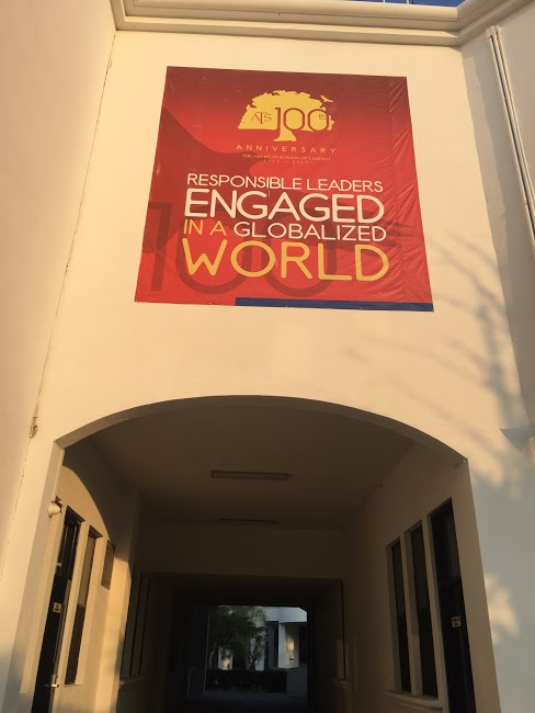 Pasillos de la escuela